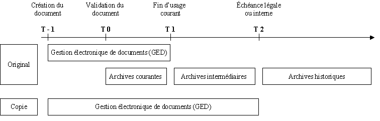 Schéma Records Management